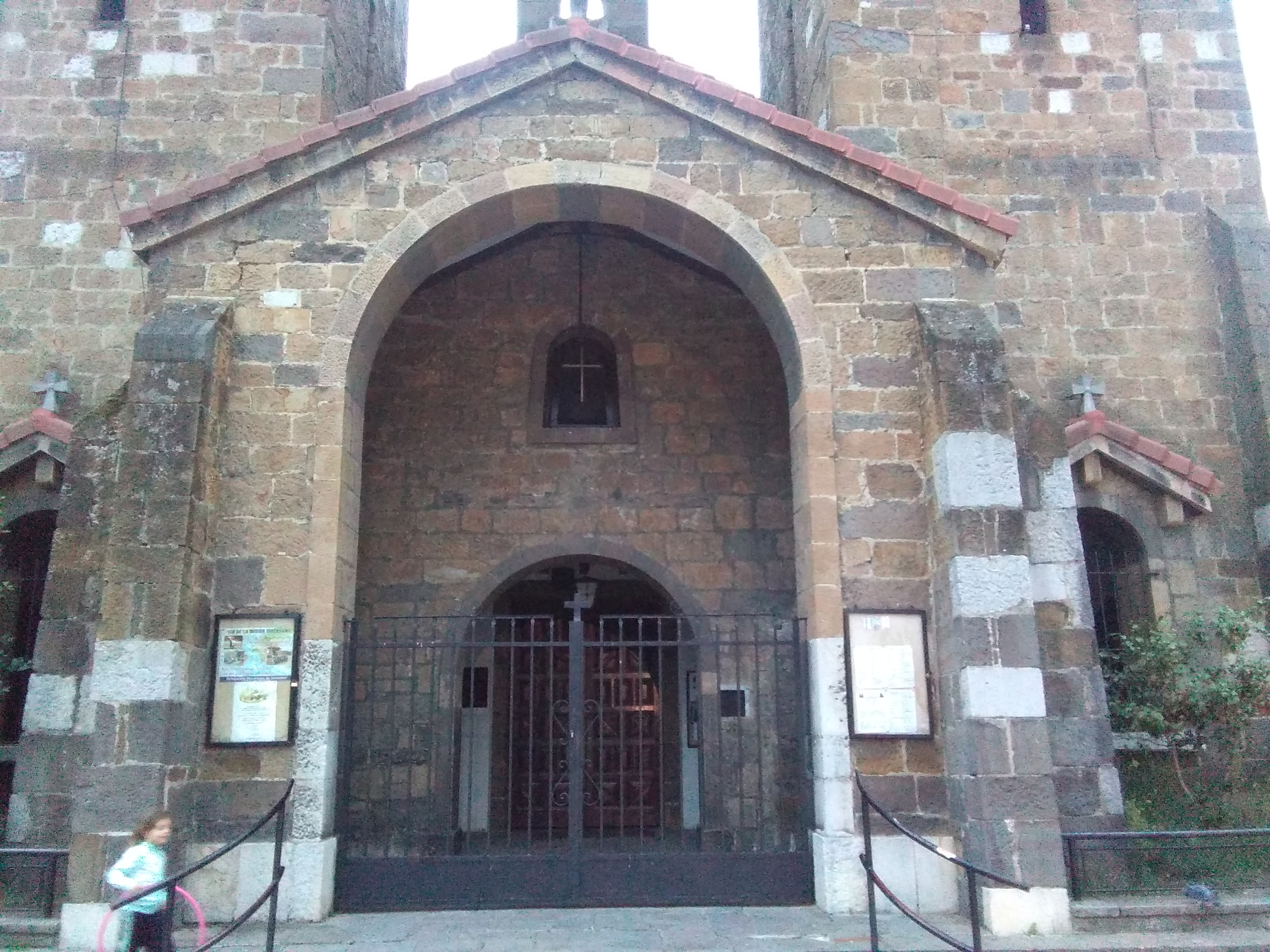 Portada de la Iglesia de San Martin de Moreda